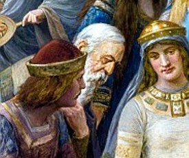 Hermann Wislicenus: Hofhaltung Friedrichs II. in Palermo; Ausschnitt: Selbstporträt des Künstlers